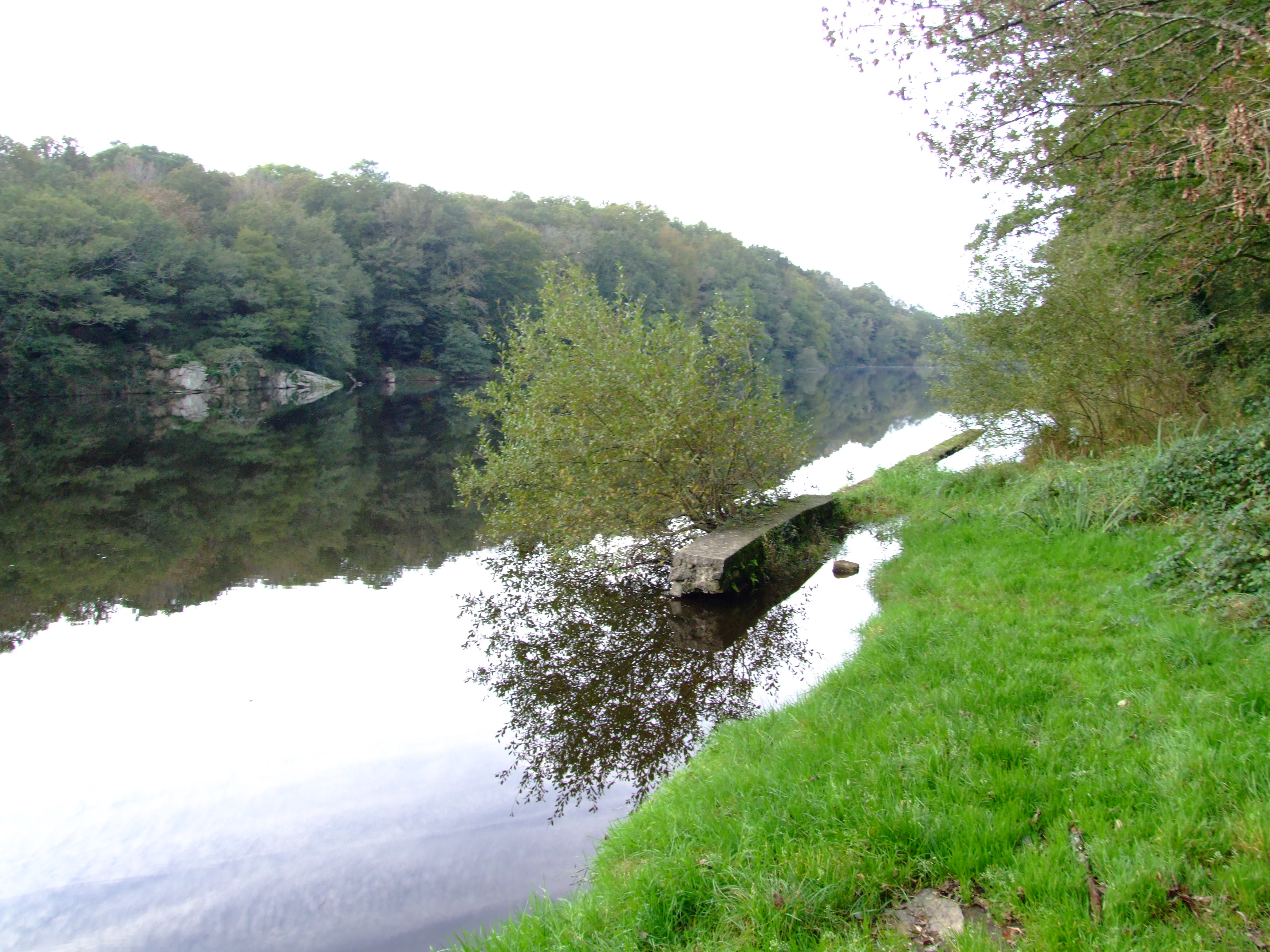 Le Loch'h est une rivière du Morbihan, Brech